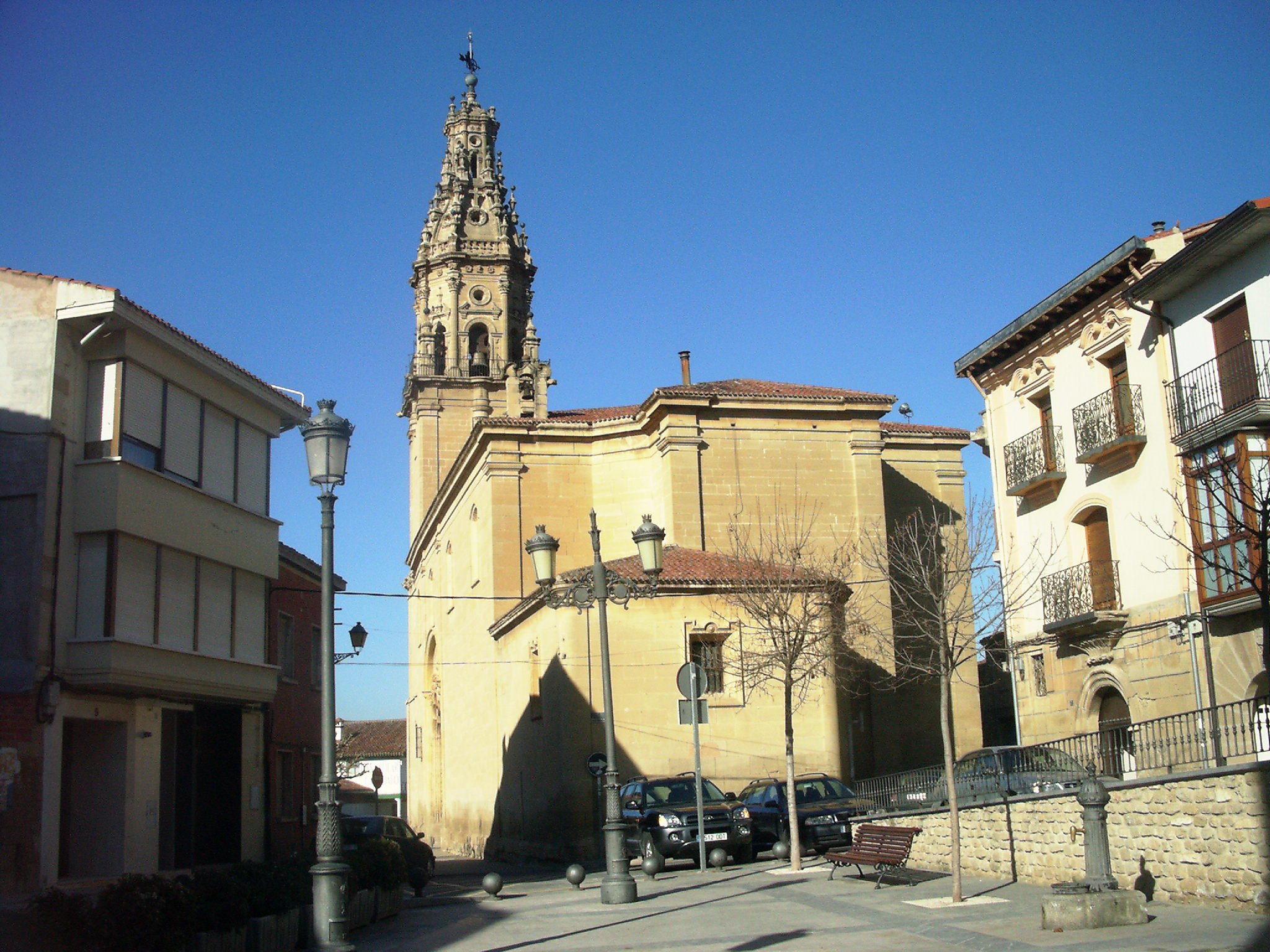 Oiongo Jasokundeko Andra Mariren eliza.